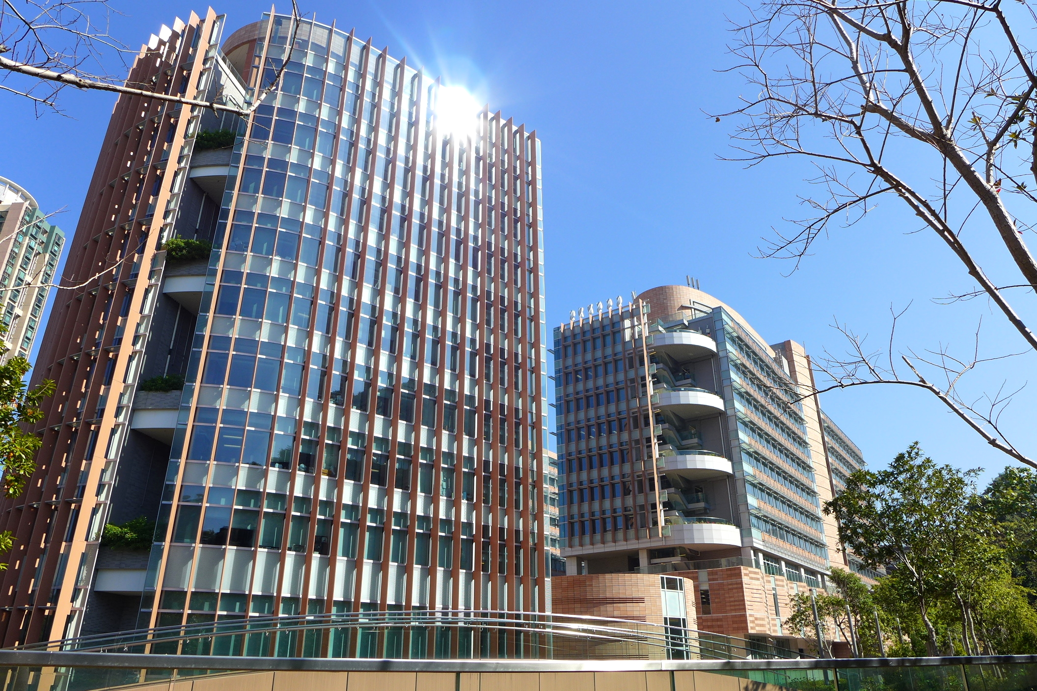 HKU Centennial Campus